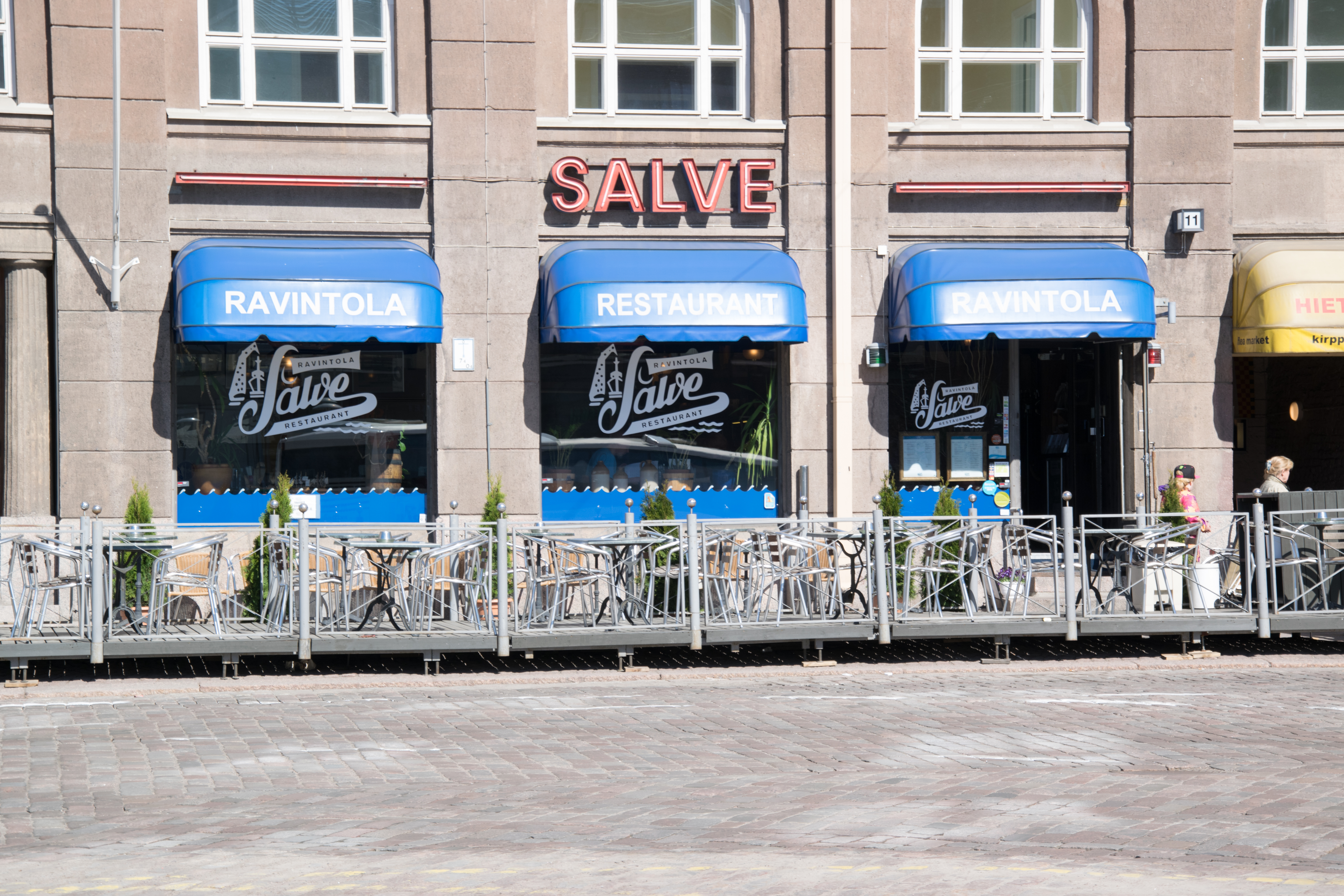 Ravintola Salve Hietalahdenrannassa toukokuussa 2014 ennen muuttoa.